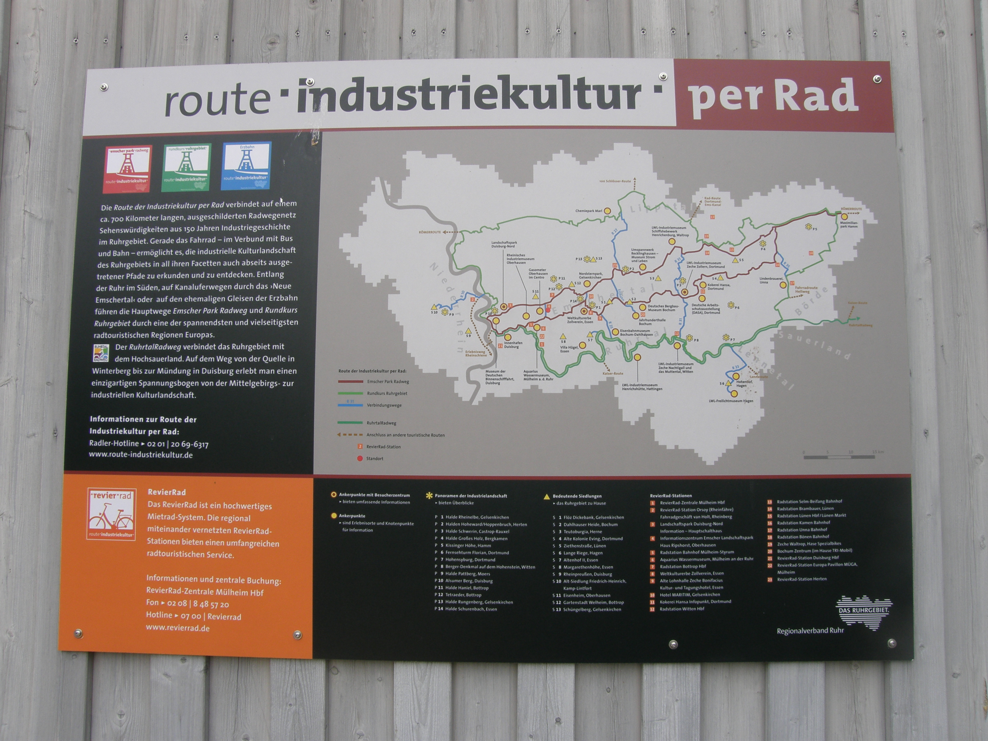 Haus Ripshorst , Infoschild Route der Industriekultur per Rad